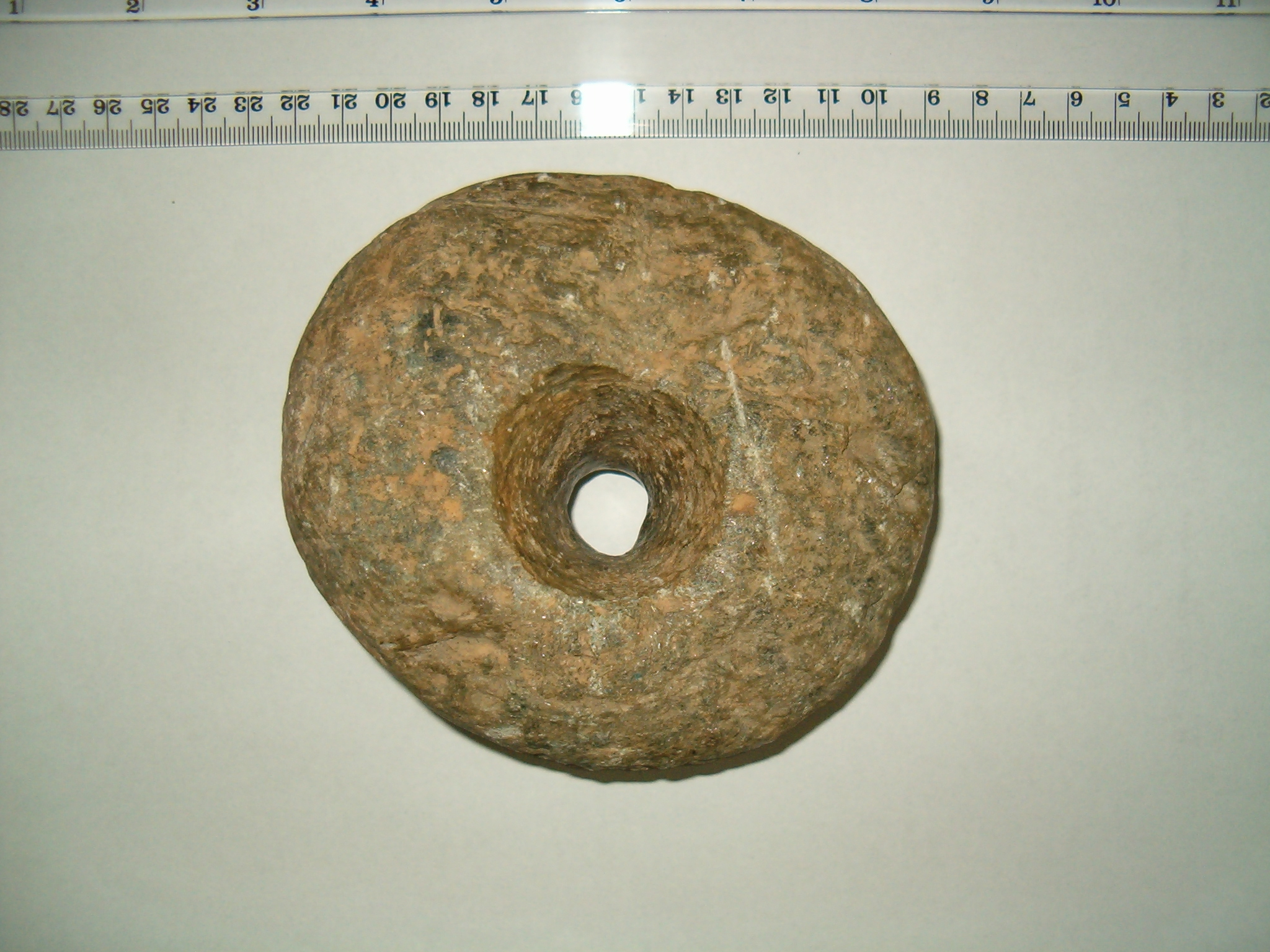 Kallion esihistoriallinen reikäkivi Tavastkengältä